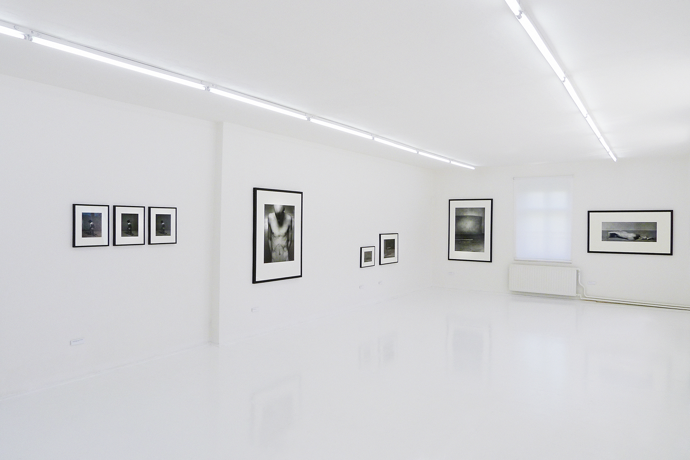 výstava Ivana Pinakvy